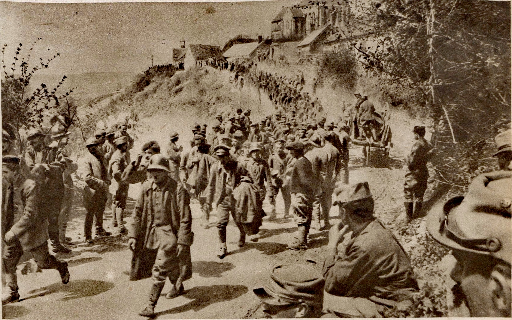 Colonne de prisonnier allemands capturés à la bataille de la Malmaison, entre le 23 et le 25 octobre 1917. Photographie publiée par l'hebdomadaire Le Miroir (n° 207) le 11 novembre 1917.